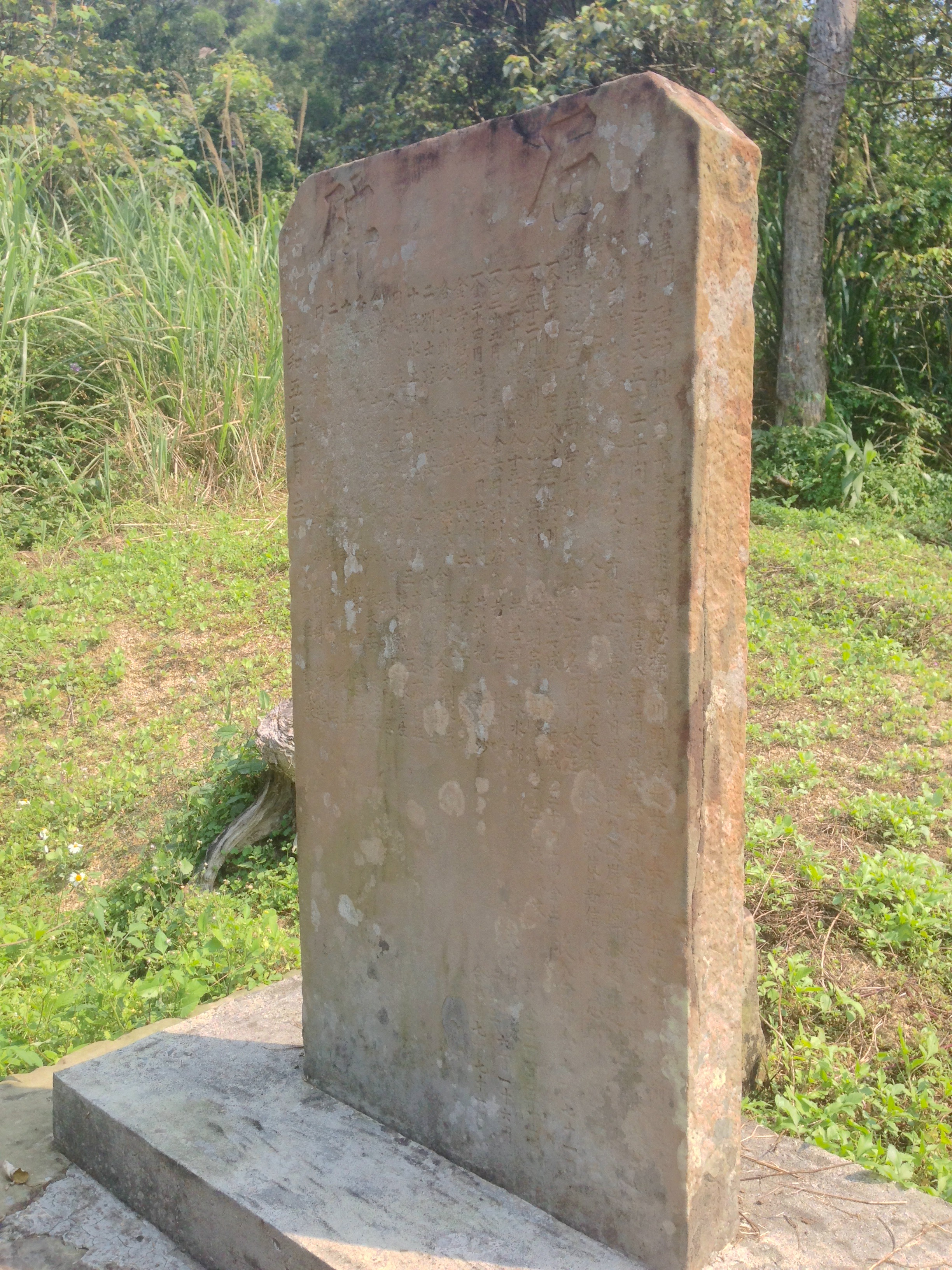 中文（台灣）: 石媽祖古道修路捐獻碑